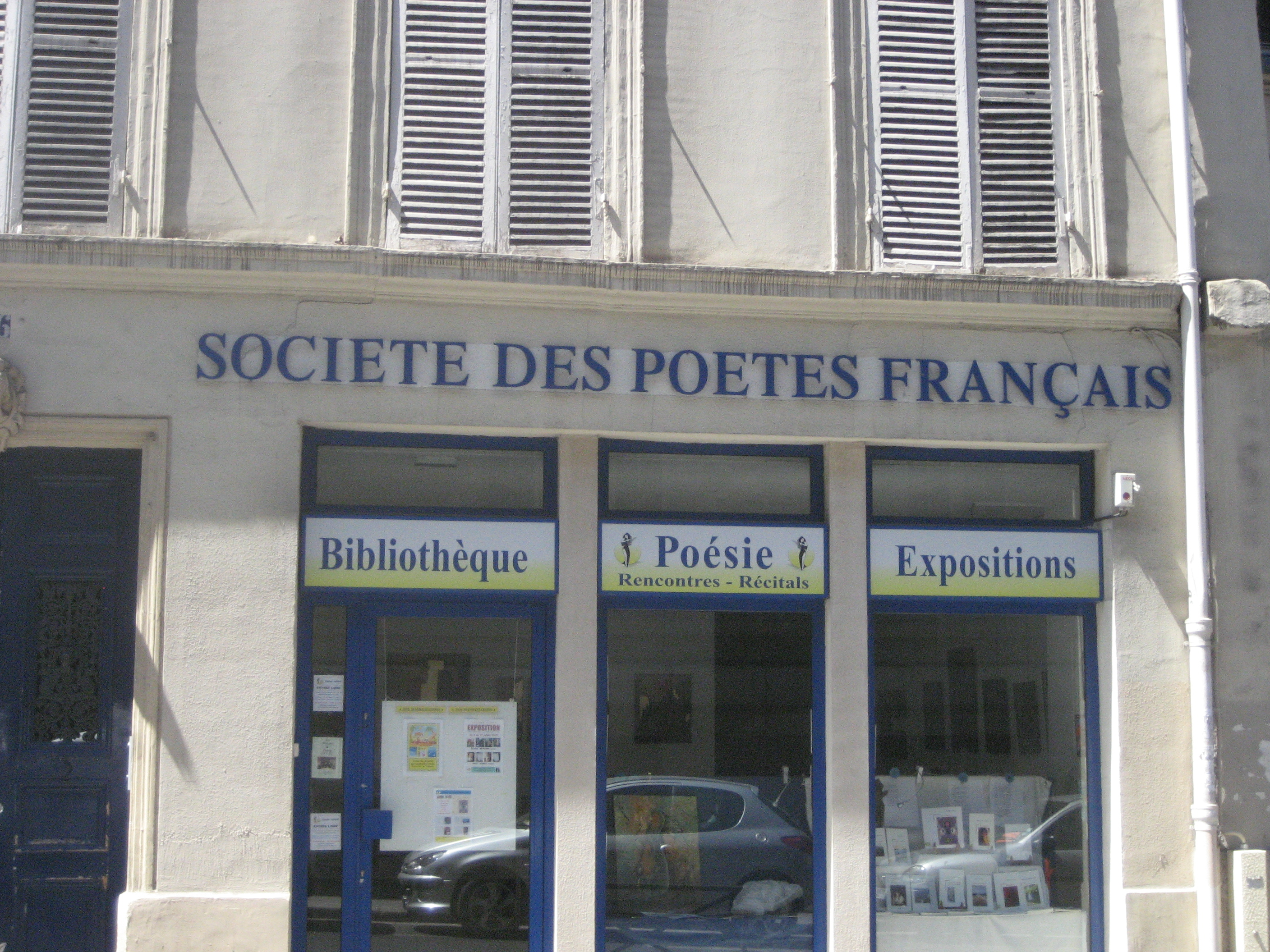 Société des poètes français, 16 rue Monsieur-le-Prince, Paris (France)